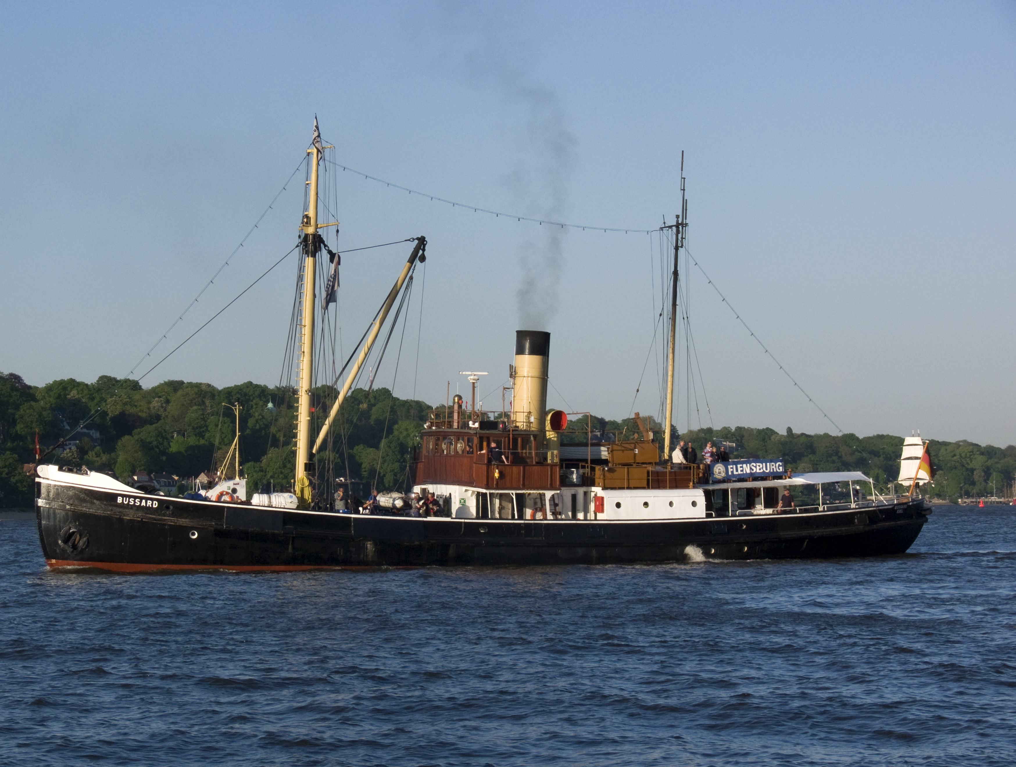 8 Mai 2011 Auslaufparade Hamburg Outbound